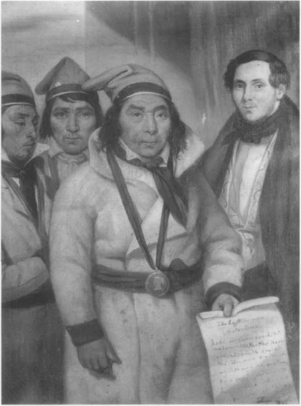 Trois chefs montagnais et Peter McLeod, huile sur toile, 46 x 36 cm docplayer.fr